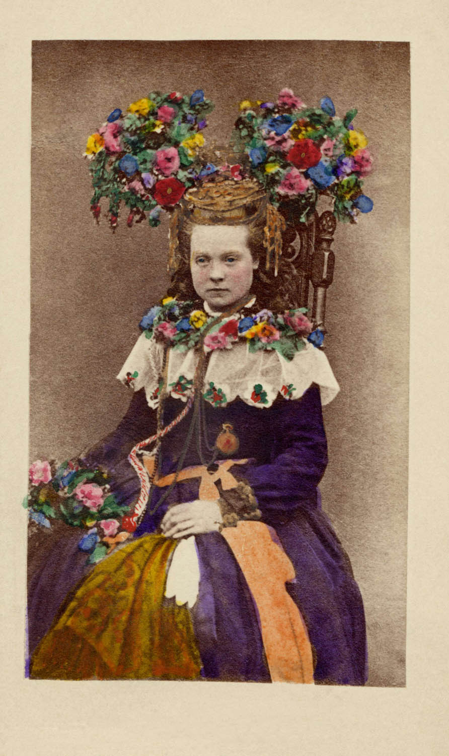 Brud från Hälsingland. Kolorerat fotografi.